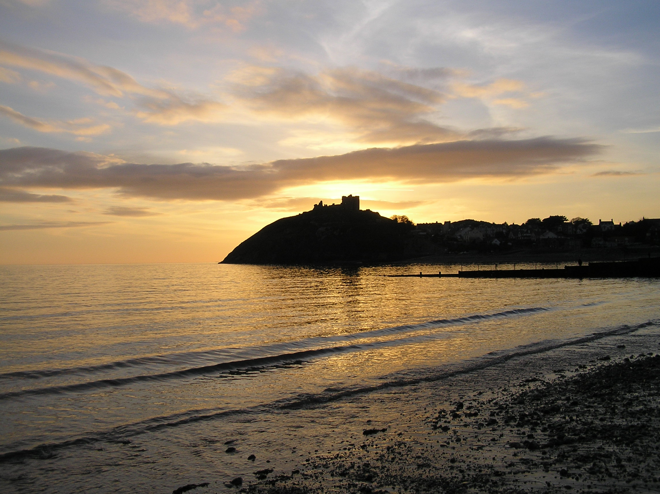 machlud haul tu ôl y castell